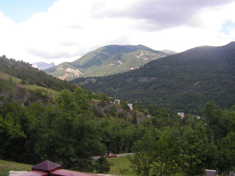 Villars-Colmars (Alpes de Haute-Provence, Paysage environnant